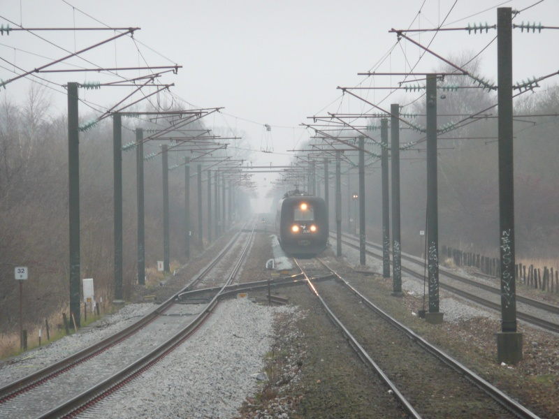 Nivåtoget i Nivå, Danmark